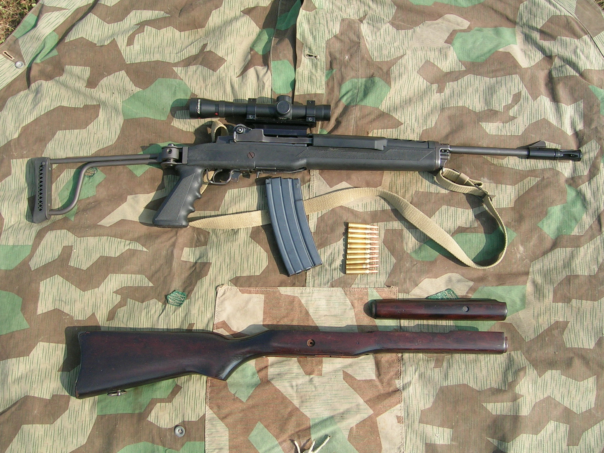 Ruger Mini 14 mit Zielfernrohr, Klappschaft, Mündungsfeuerdämpfer, 30-Schuss-Magazin und 10 Schuss Munition Cal. .223 Rem. Das hier gezeigte Gewehr stammt aus Beständen der irischen Polizei. Der originale Schaft (unterhalb des Gewehrs) wurde ausgetauscht. Bei den Zusatzteilen (Klappschaft, Zielfernrohr, Mündungsfeuerdämpfer und Magazin) handelt es sich ebenfalls nicht um Teile, die ursprünglich an dem Gewehr angebracht waren. Foto: Snoweater Datum: 25.Juli 2006. Dieses Foto ist frei verwendbar!